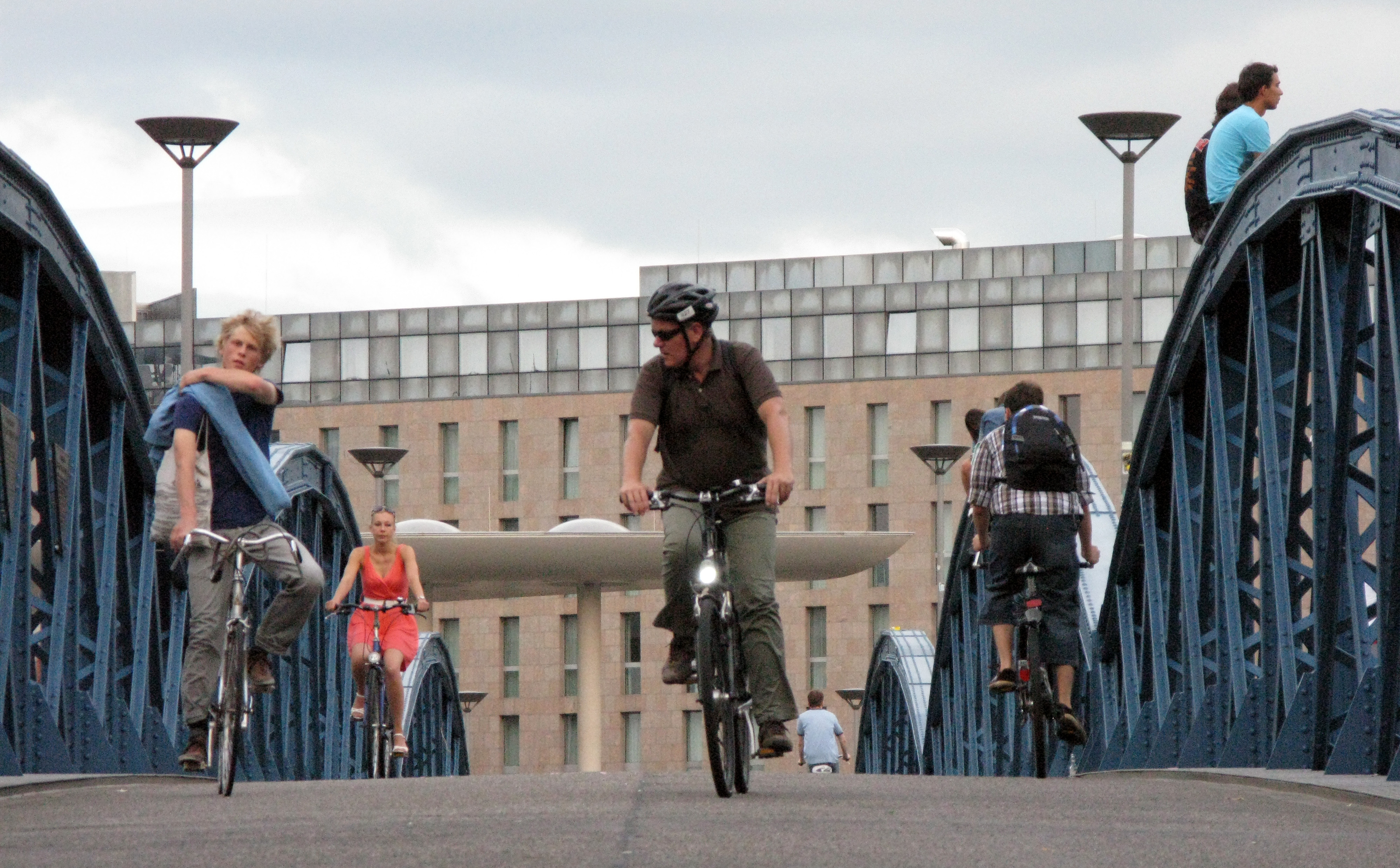 Radfahrer auf der Wiwilibrücke in Freiburg, im Hintergrund das Novotel mit Dach des Konzerthauses